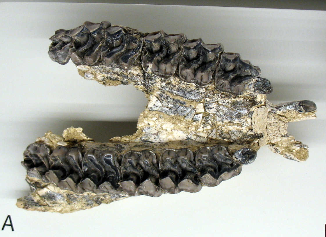 Maxilar de Anchitherium sp. Yacimiento Carpetana (Madrid, España). Exposición temporal "La colina de los tigres dientes de sable. Los yacimientos miocenos del cerro de los Batallones (Torrejón de Velasco, Comunidad de Madrid)" en el Museo Arqueológico Regional (MAR), Alcalá de Henares (Madrid)